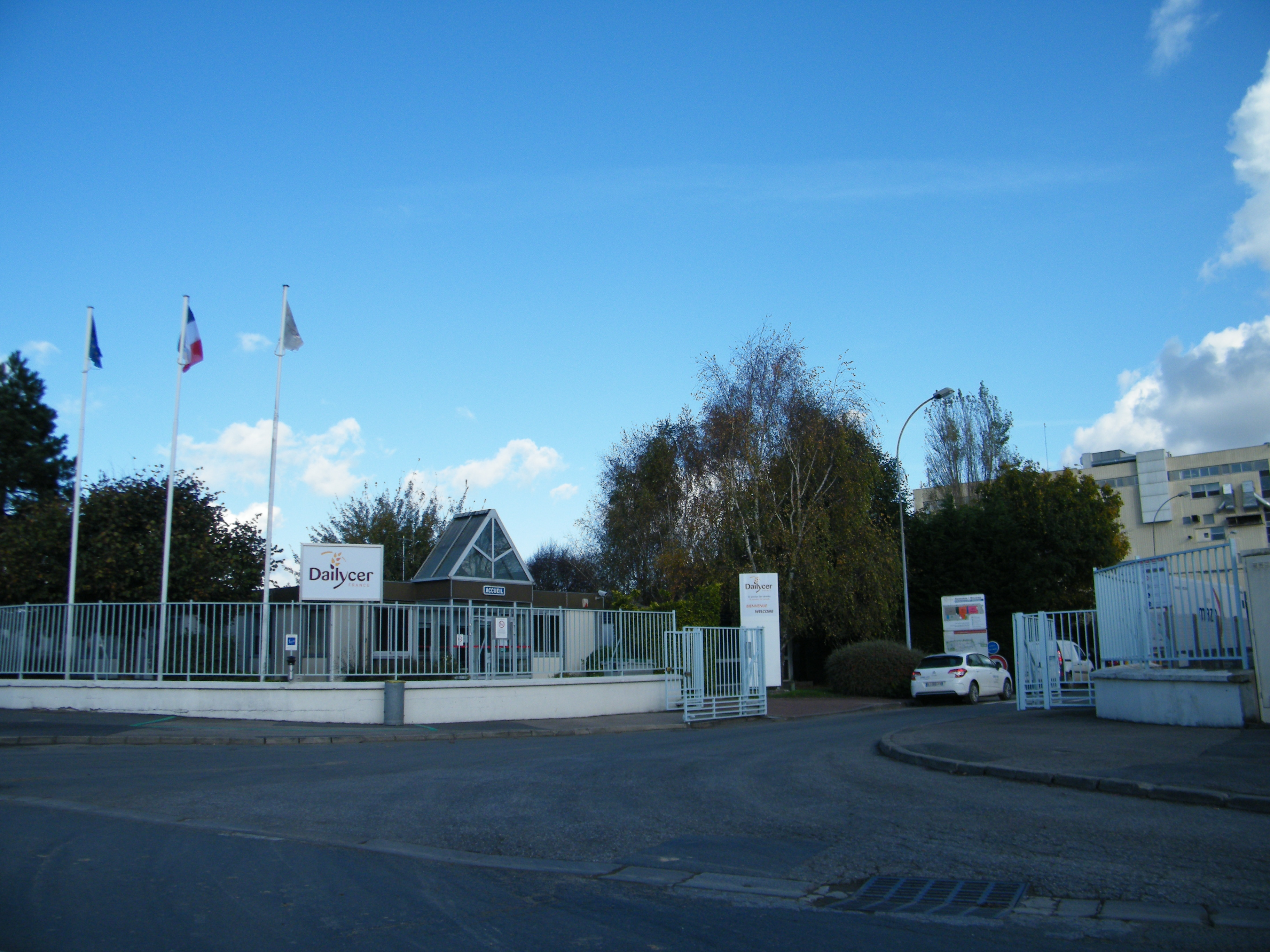 Bâtiments industriels.